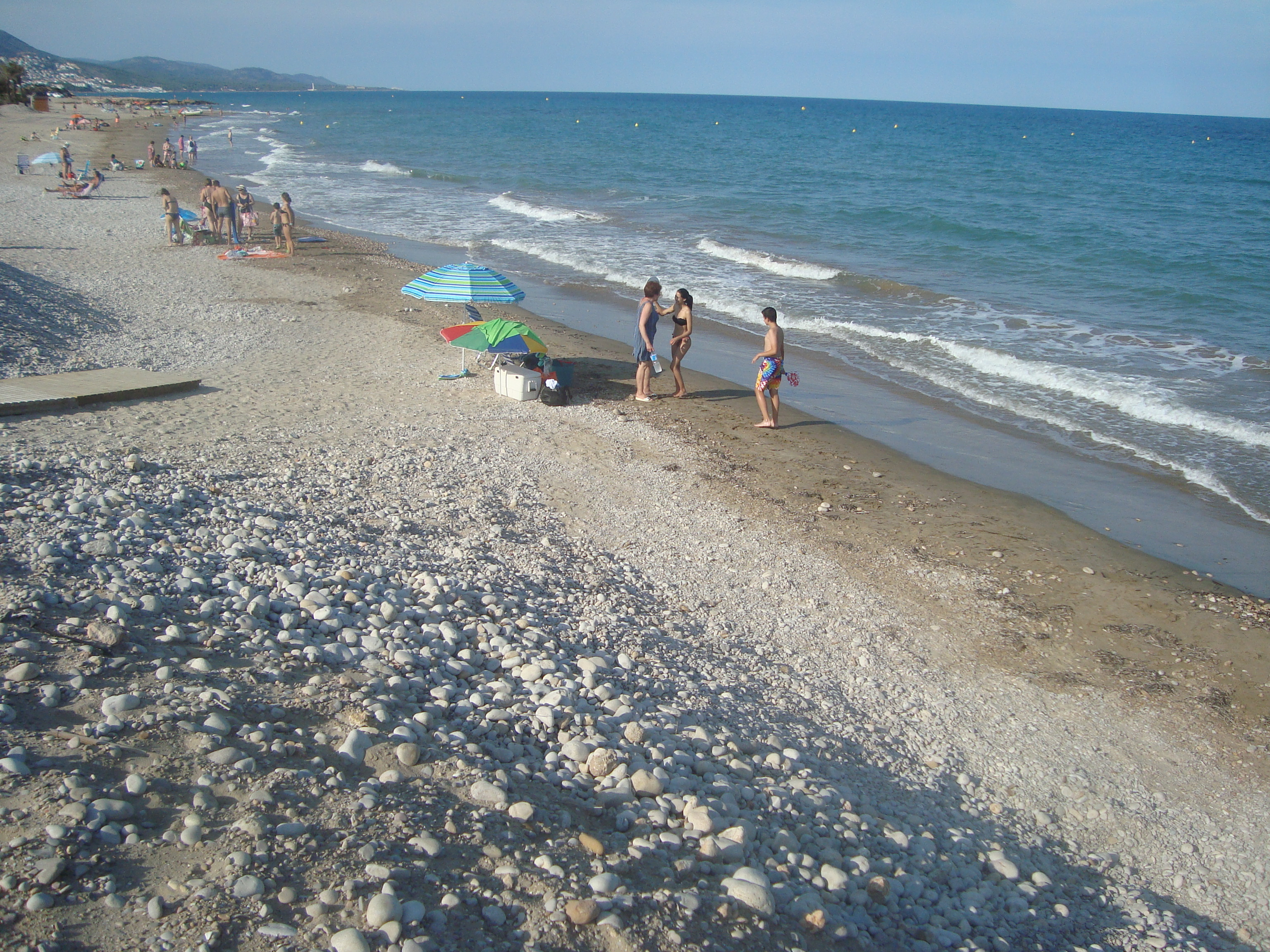 Playa Mañetes (platja Manyetes), playa Tropicana (Alcossebre)